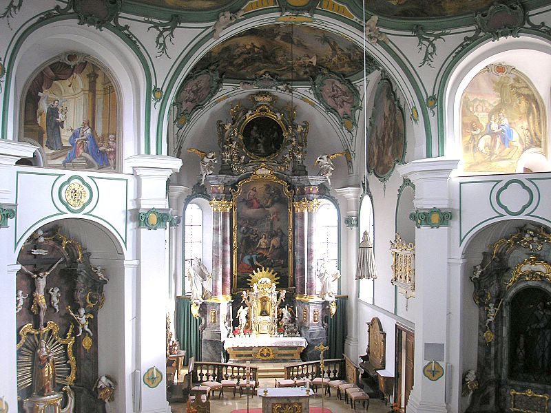 Pfarrkirche St. Vitus (Egling an der Paar, Landkreis Landsberg am Lech, Oberbayern). Innenraum nach Osten. Eigene Aufnahme, Okt. 2006 / Parish church St. Vitus (Egling an der Paar, Upper Bavaria, Germany). Interior, looking east. Own photo, Oct. 2006